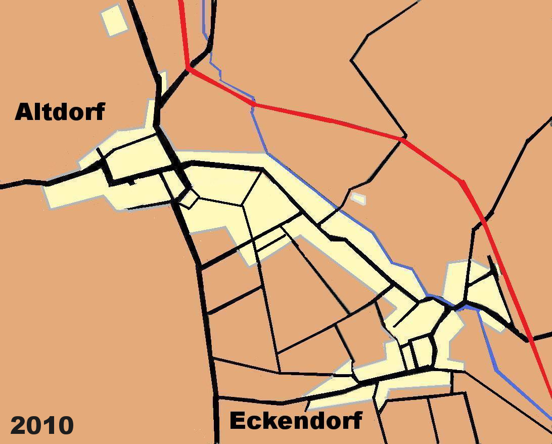 plan sommaire de la commune d'Alteckendorf en 2010 Légende: noir=routes, rouge=chemin de fer. bleu=ruisseau du Landgraben, jaune pale=zone urbanisée orange= champs et/ou prairies